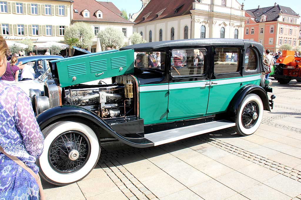 1926 Stutz Sedan_IMG_4132